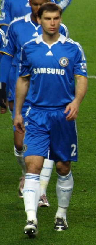 Branislav Ivanovic